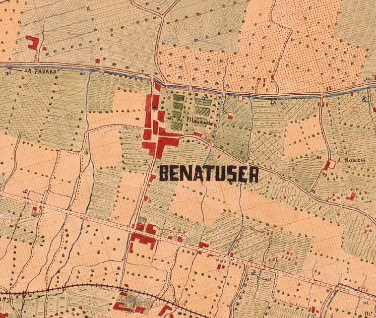 Benetússer el 1883 (el nord està a la dreta).